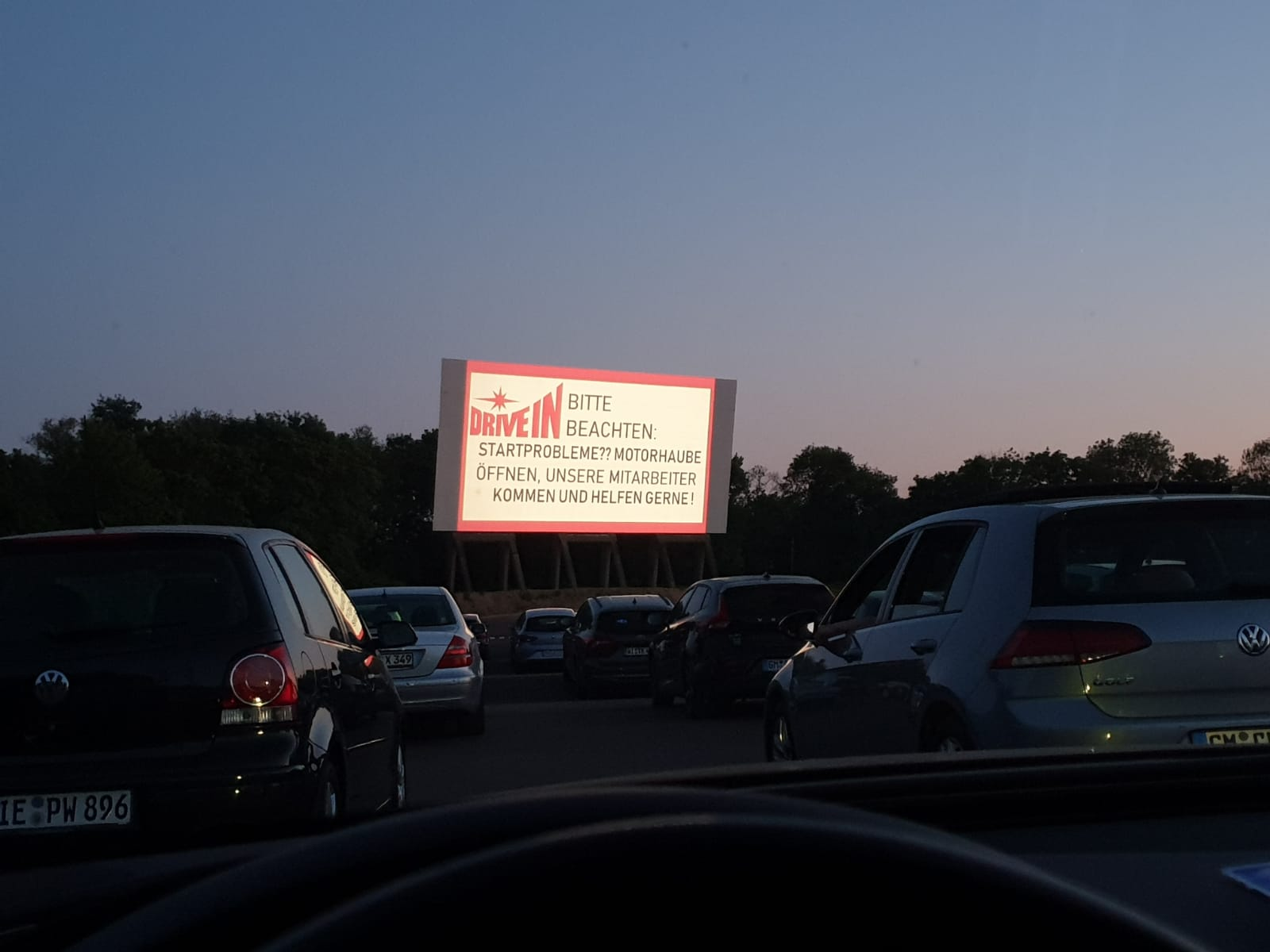 Das Autokino Köln-Porz während einer Abendvorstellung